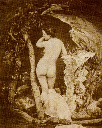 Baigneuse Paris, BnF, département des Estampes et de la Photographie